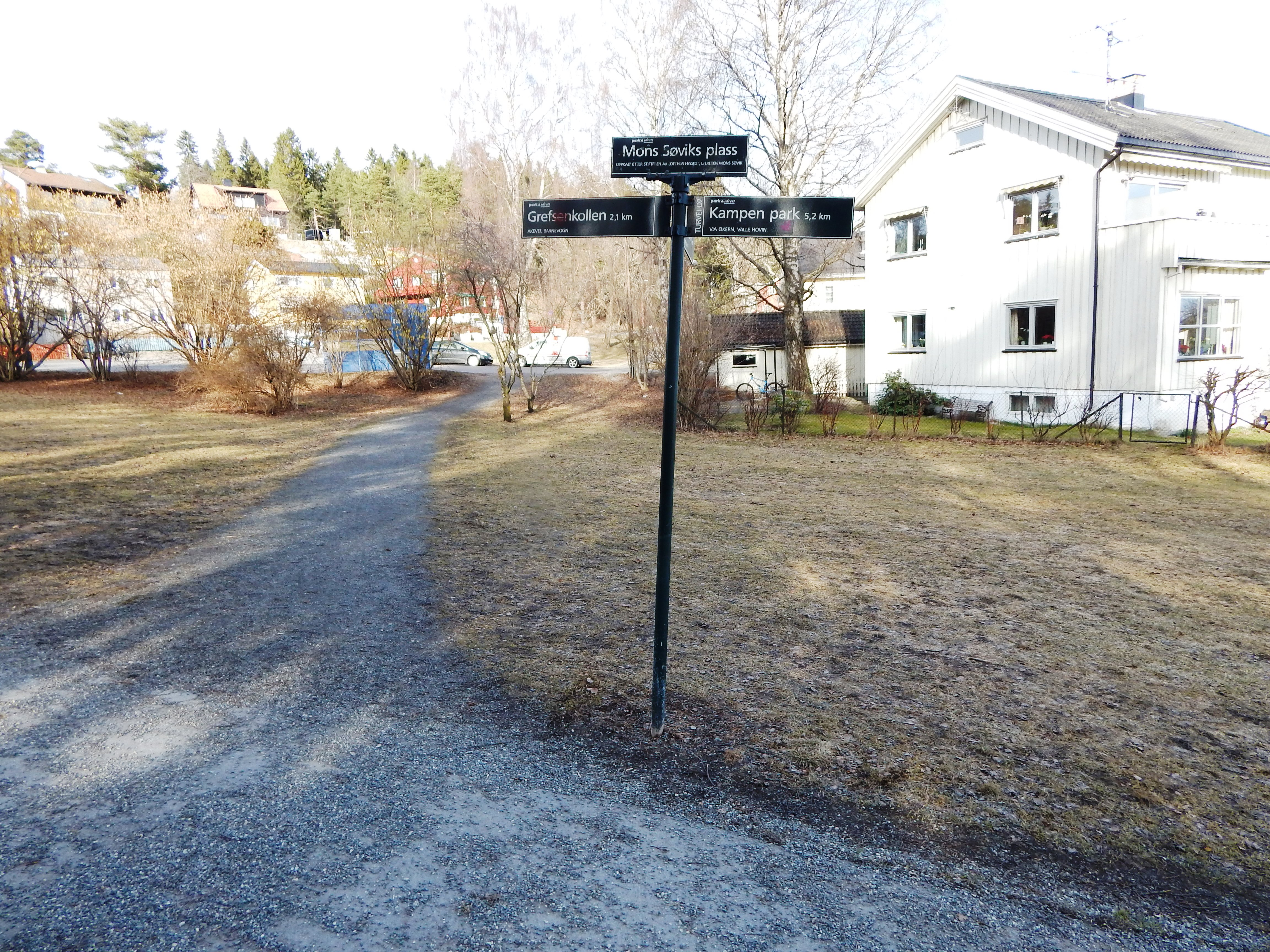 Skilt ved Mons Søviks plass